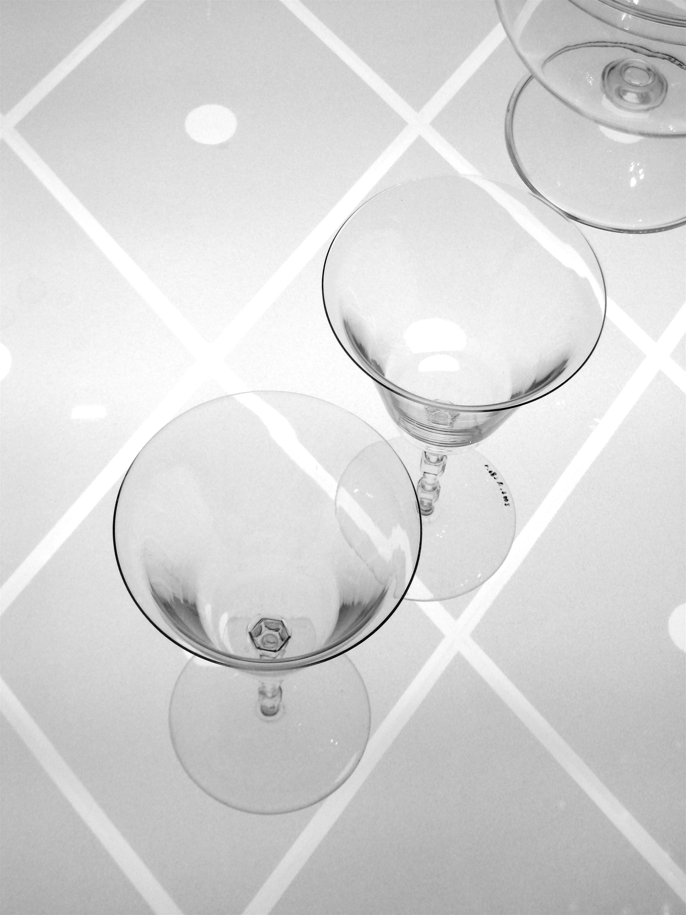 Verres en cristal, musée Baccarat, Paris, France